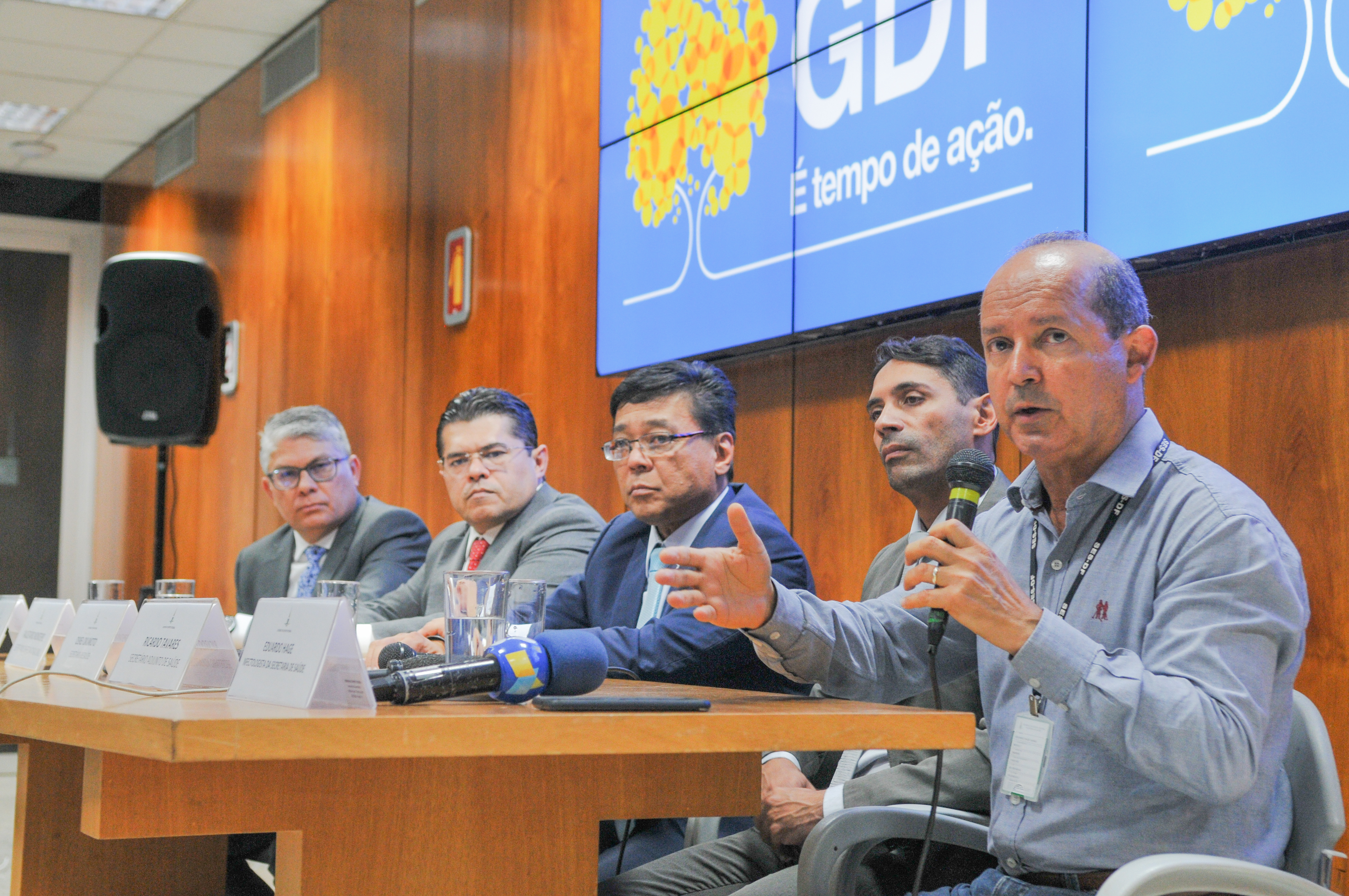 A Secretaria de Saúde do Distrito Federal aguarda contraprova para confirmar diagnóstico do primeiro caso de infecção por coronavírus na capital. Uma paciente de 52 anos teve primeiro resultado indicado como positivo em um laboratório particular da capital. Para confirmação, amostras clínicas serão analisadas em São Paulo, no Instituto Adolfo Lutz, como prevê o Ministério da Saúde (MS). Ela será transferida ao Hospital Regional da Asa Norte (Hran). Foto Renato Araújo / Agência Brasília